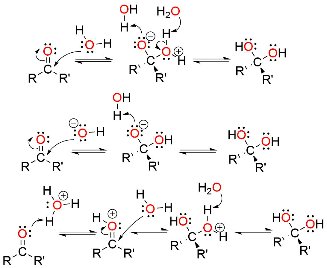 Hydrataatioreaktion mekanismi neutraaleissa, emäksisissä ja happamissa olosuhteissa.